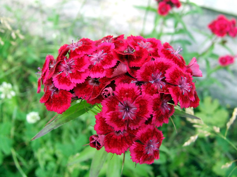 Dianthus barbatus. Veseluvka, Jonava district, Lithuania.